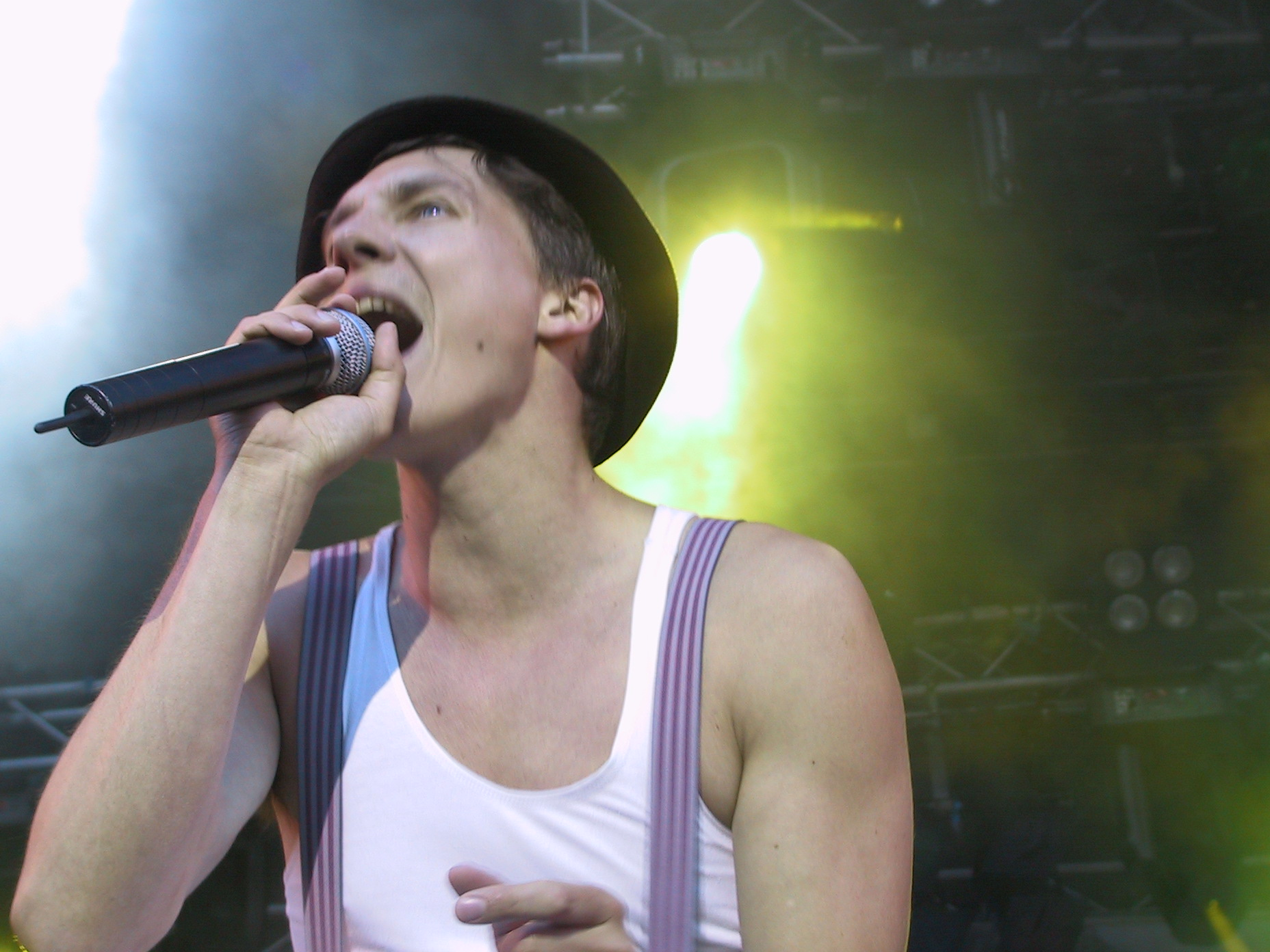 Håkan Hellström under Arvikafestivalen i Arvika.